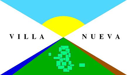 Realizada por una vecina de la ciudad en 2005